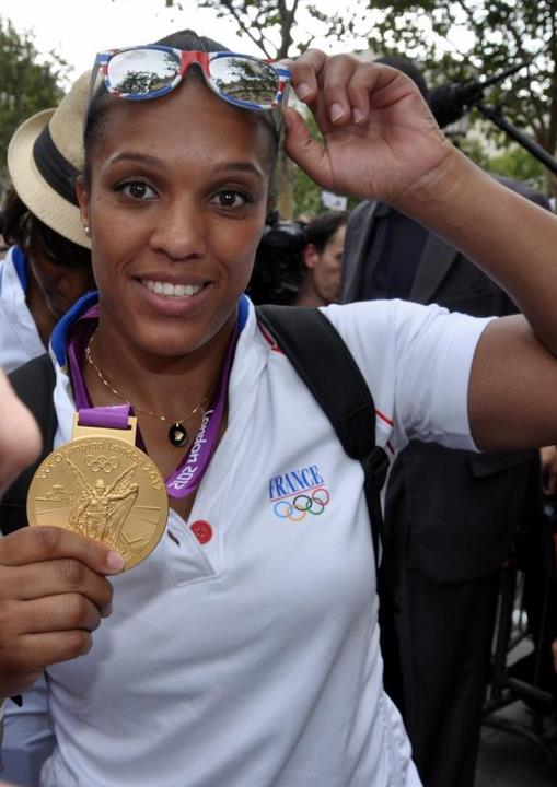 Lucie Décosse au défilé des médaillés français des JO 2012